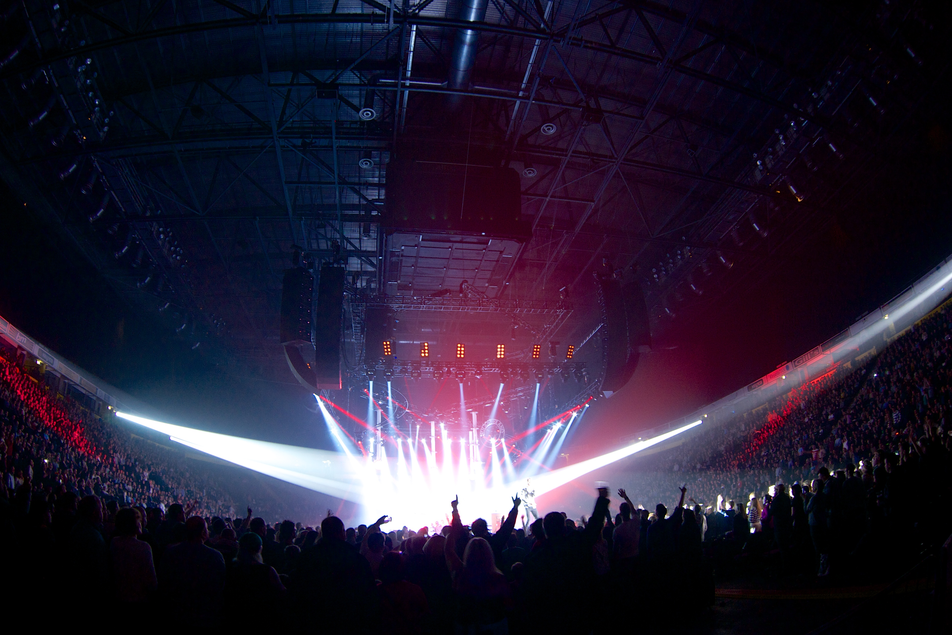 Keane, Manchester, 2012